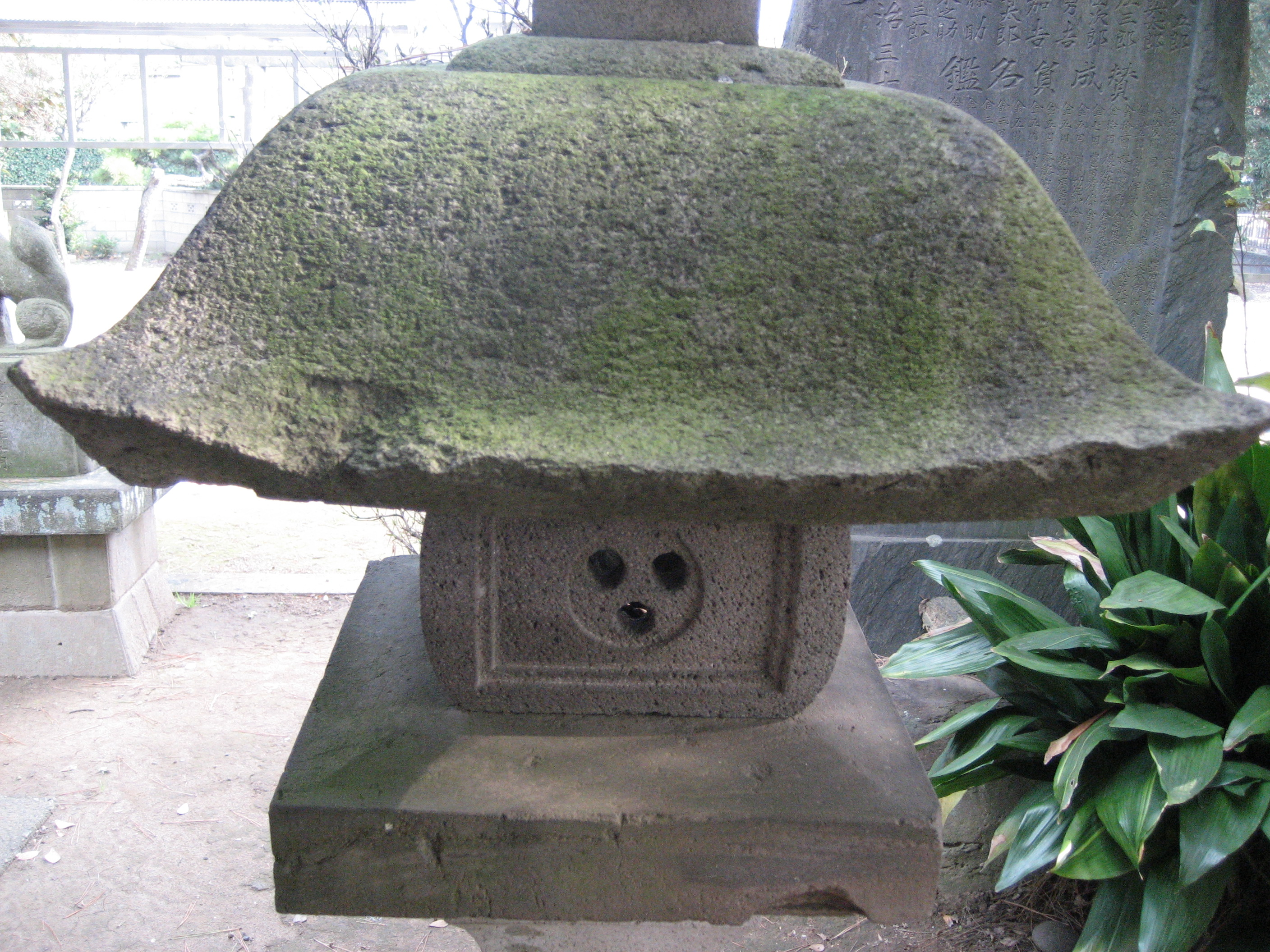 "tourou in tango,三郷市丹後神社の灯籠。三つの穴が開いている。"